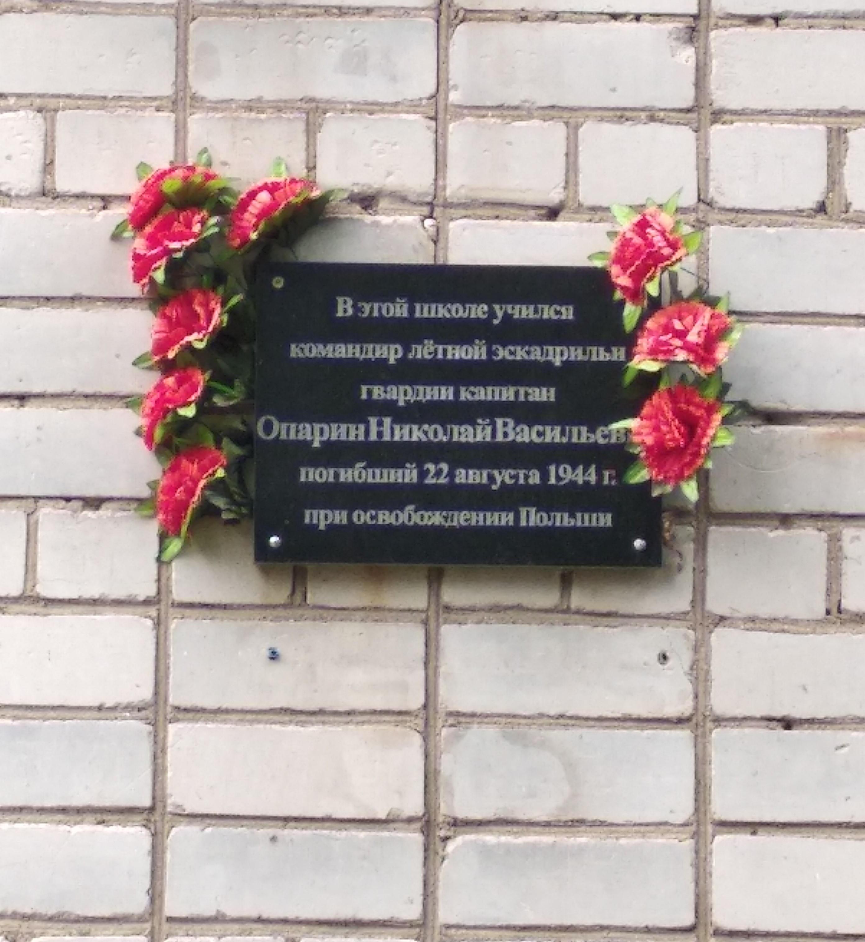 Табличка в честь советского лётчика, командира 1-й авиаэскадрильи Опарина Николай Васильевич на Шурскольской школе